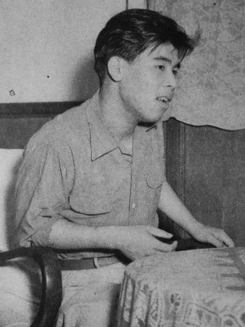 空谷泰